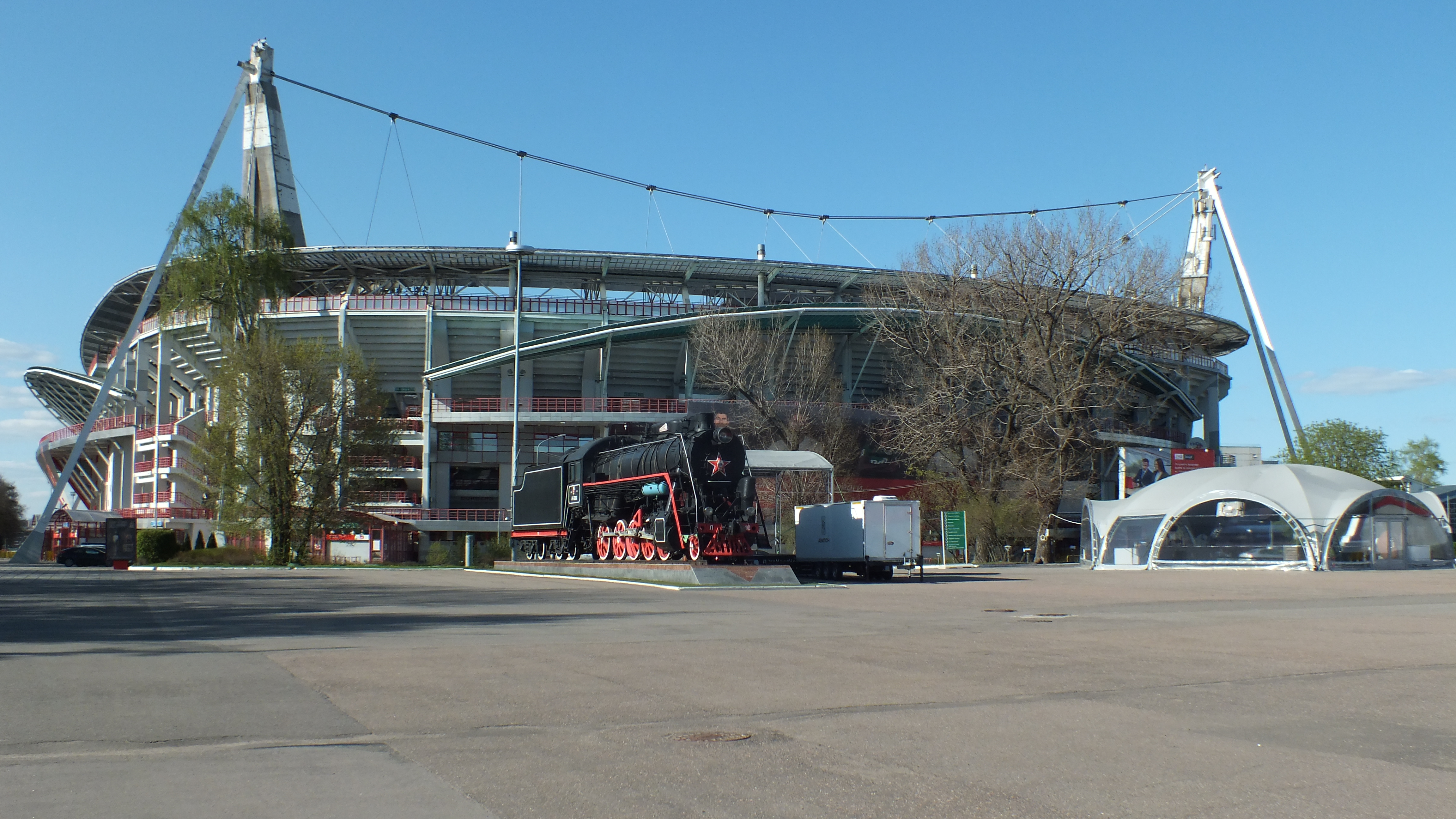 Стадион «Локомотив», вид с Большой Черкизовской улицы. Май 2017 года